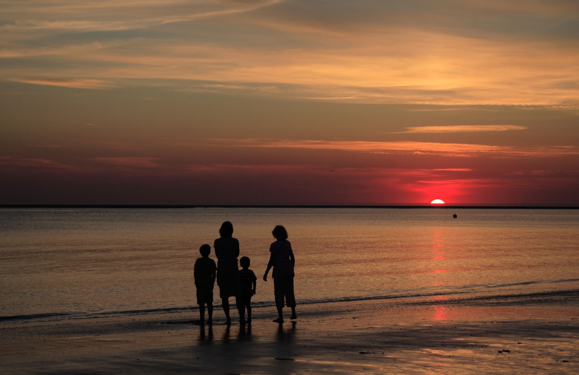 Beobachtung eines Sonnenuntergangs an der Nordsee